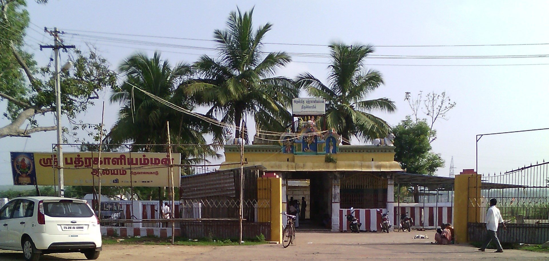 திருவாலங்காடு காளி கோயில்